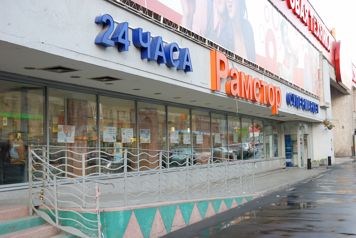 Fasáda obchodu Ramstor v Moskvě